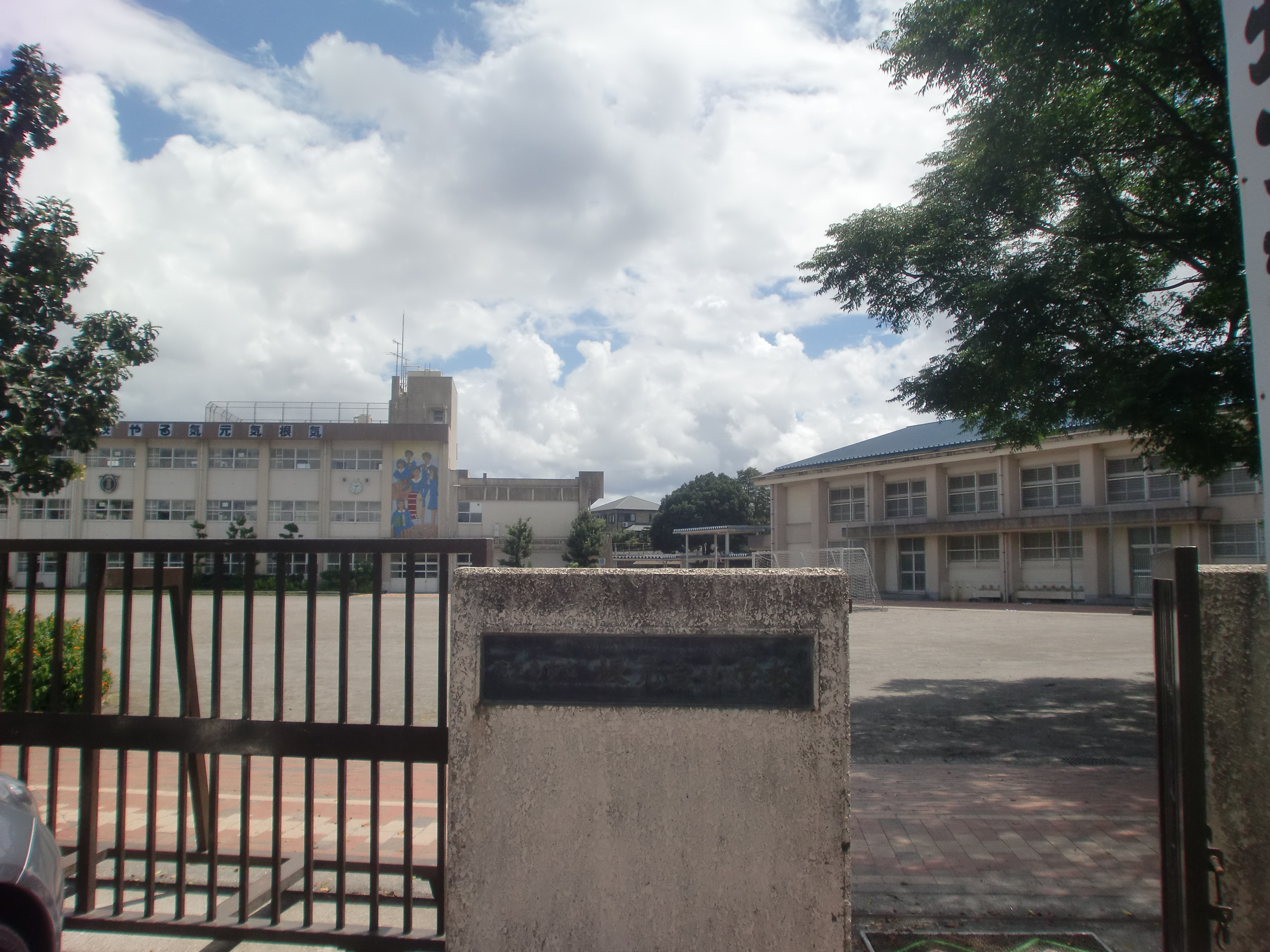 鹿児島市立坂元台小学校の外観。